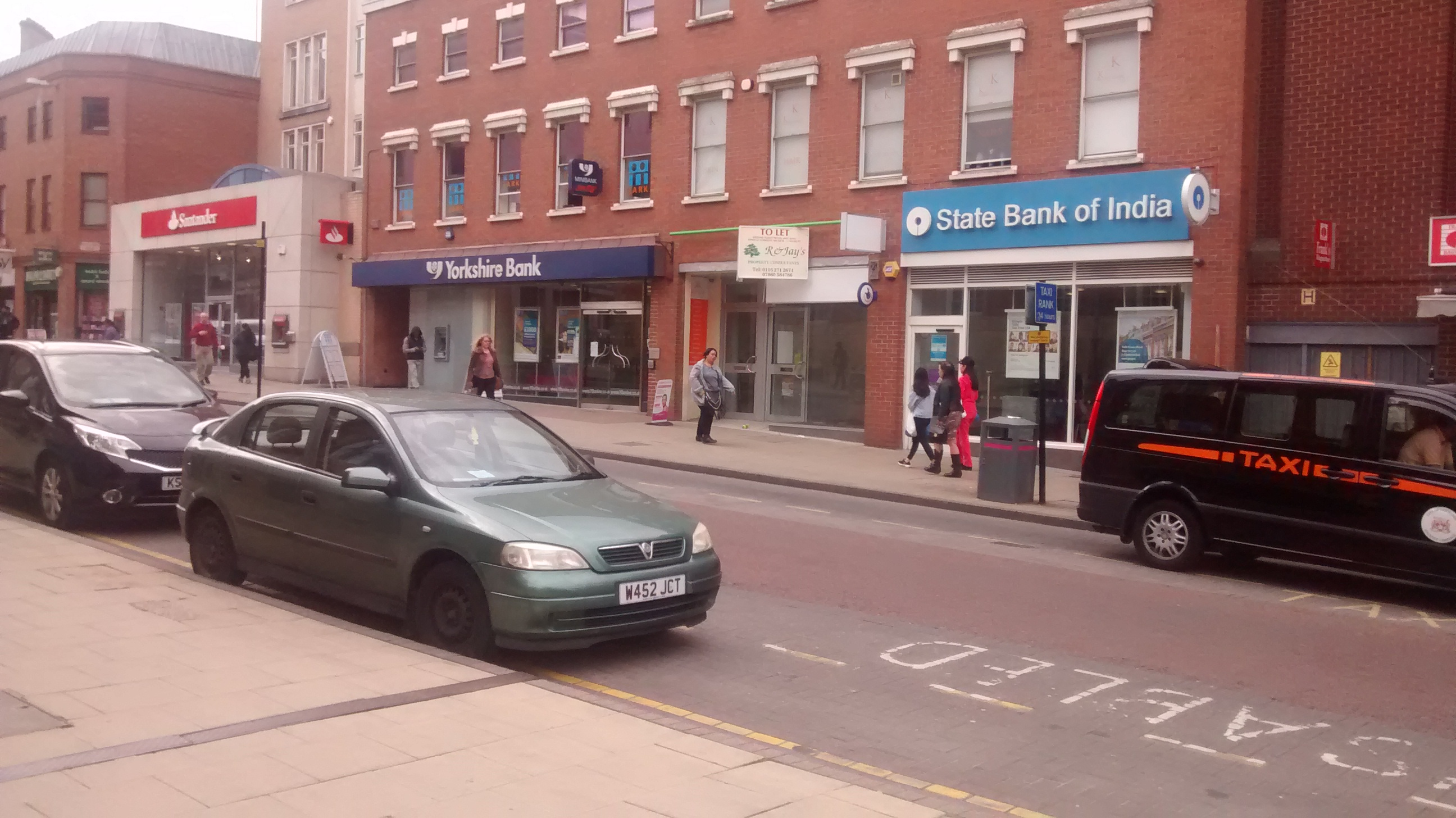 Banki - od lewej Bank Santander, Yorkshire Bank, State Bank of India